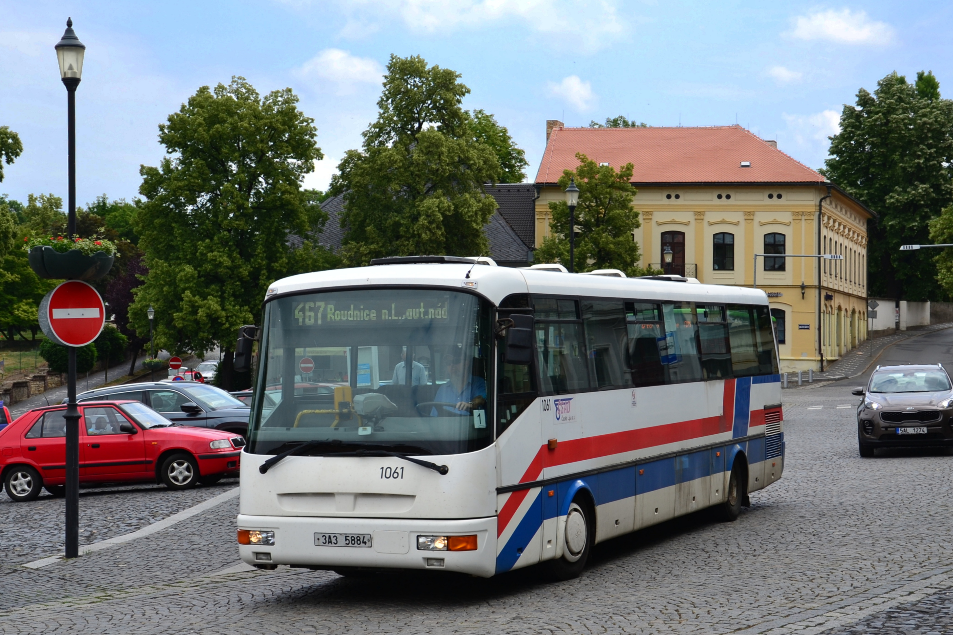 Vůz SOR C10.5 na lince 467 v Roudnici nad Labem